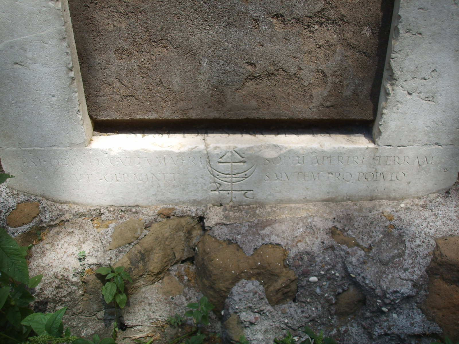 Magic gate (Porta magica) in Piazza Vittorio Emanuele, in Rome, Italy